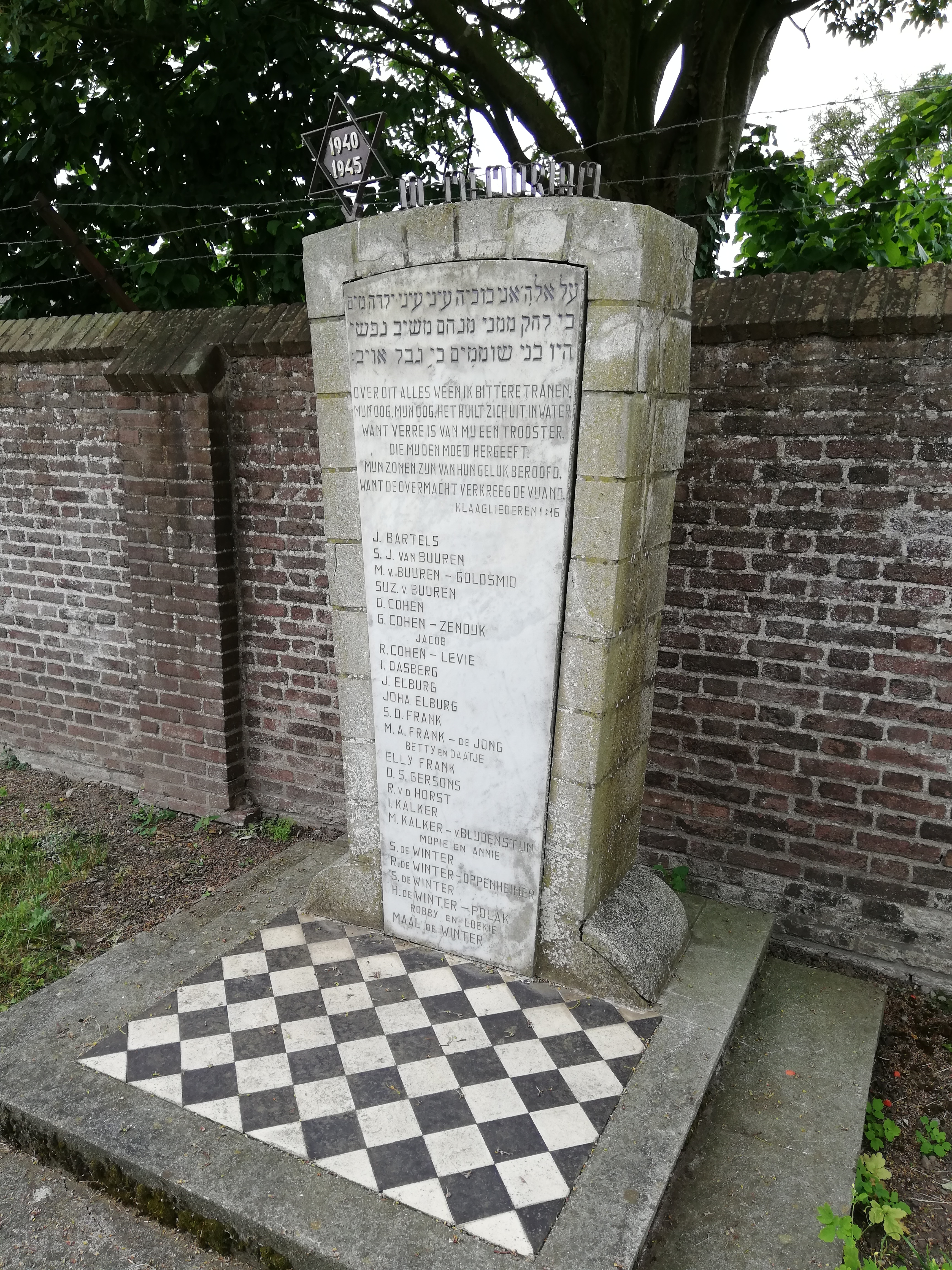 Monument op de Joodse begraafplaats, Voor de Kijkuit, Tiel